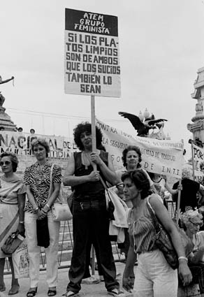 Primer Día Internacional de la Mujer en Democracia, celebración del grupo feminista ATEM.